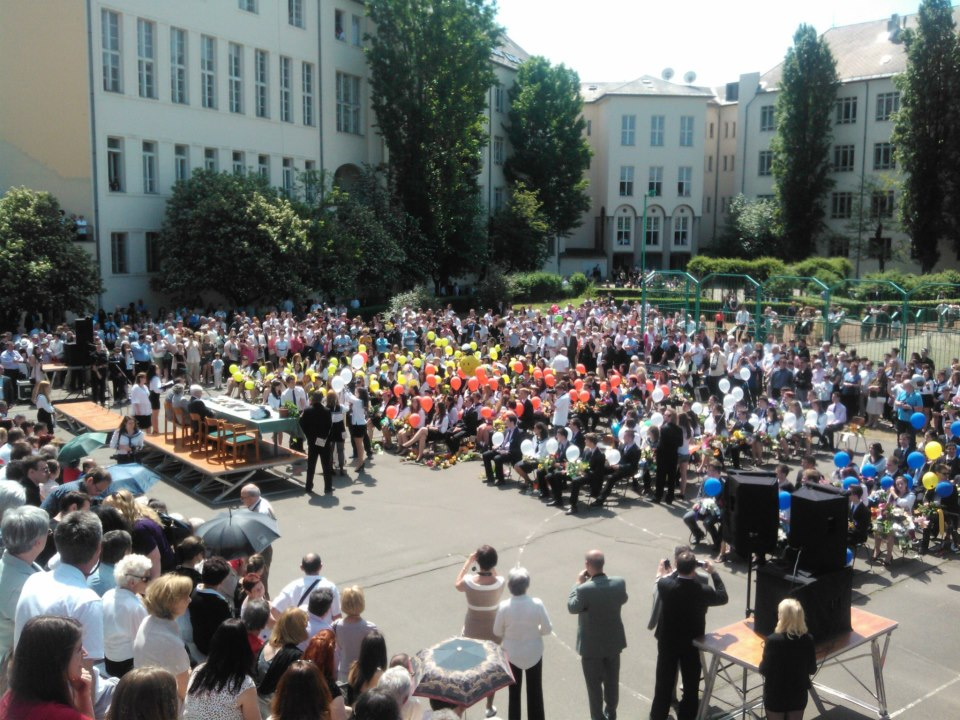 A budapesti Szent László Gimnázium 2013-as ballagási ünnepsége